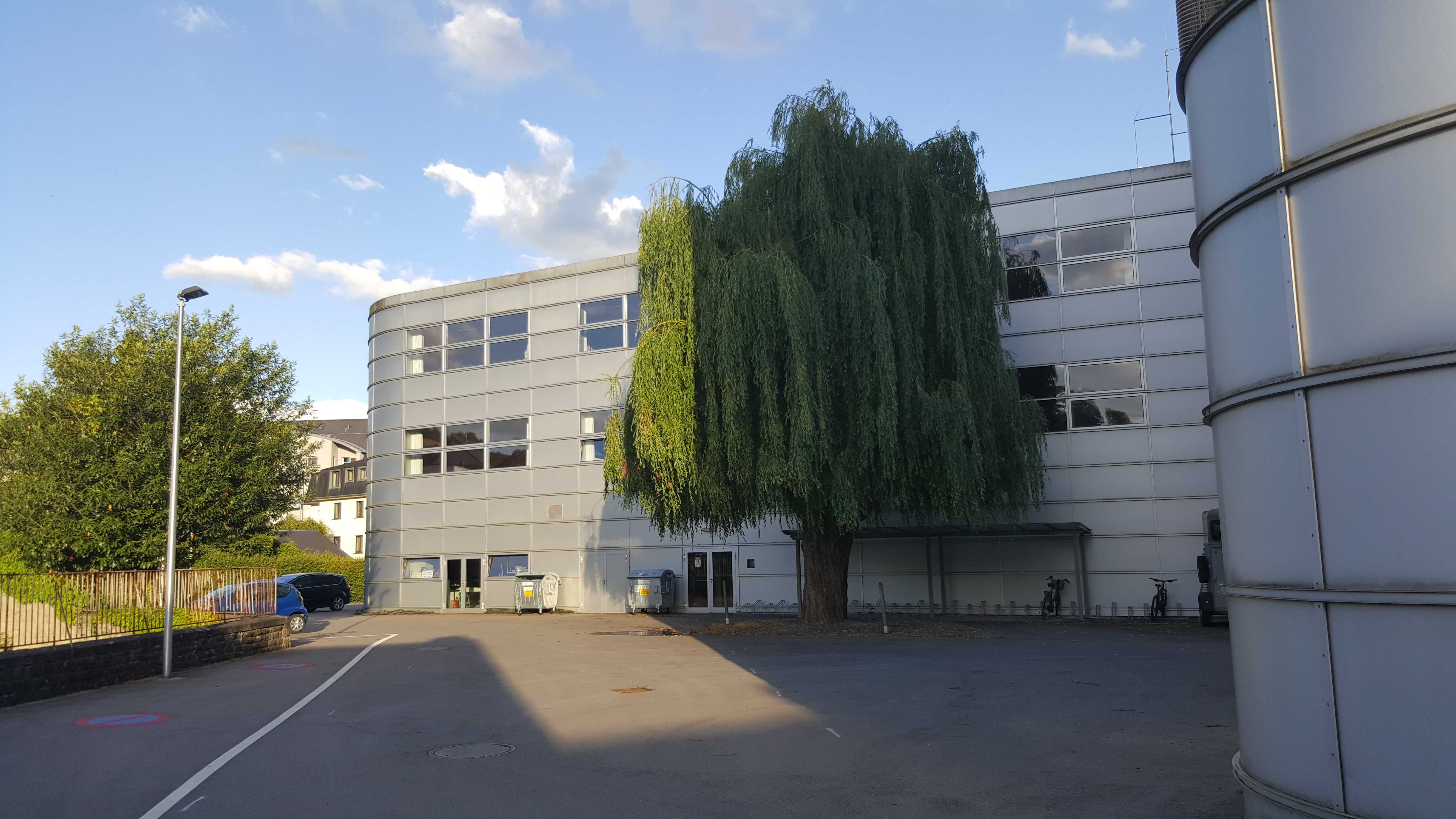 De Lycée classique zu Dikrech Récksäit am Juni 2016